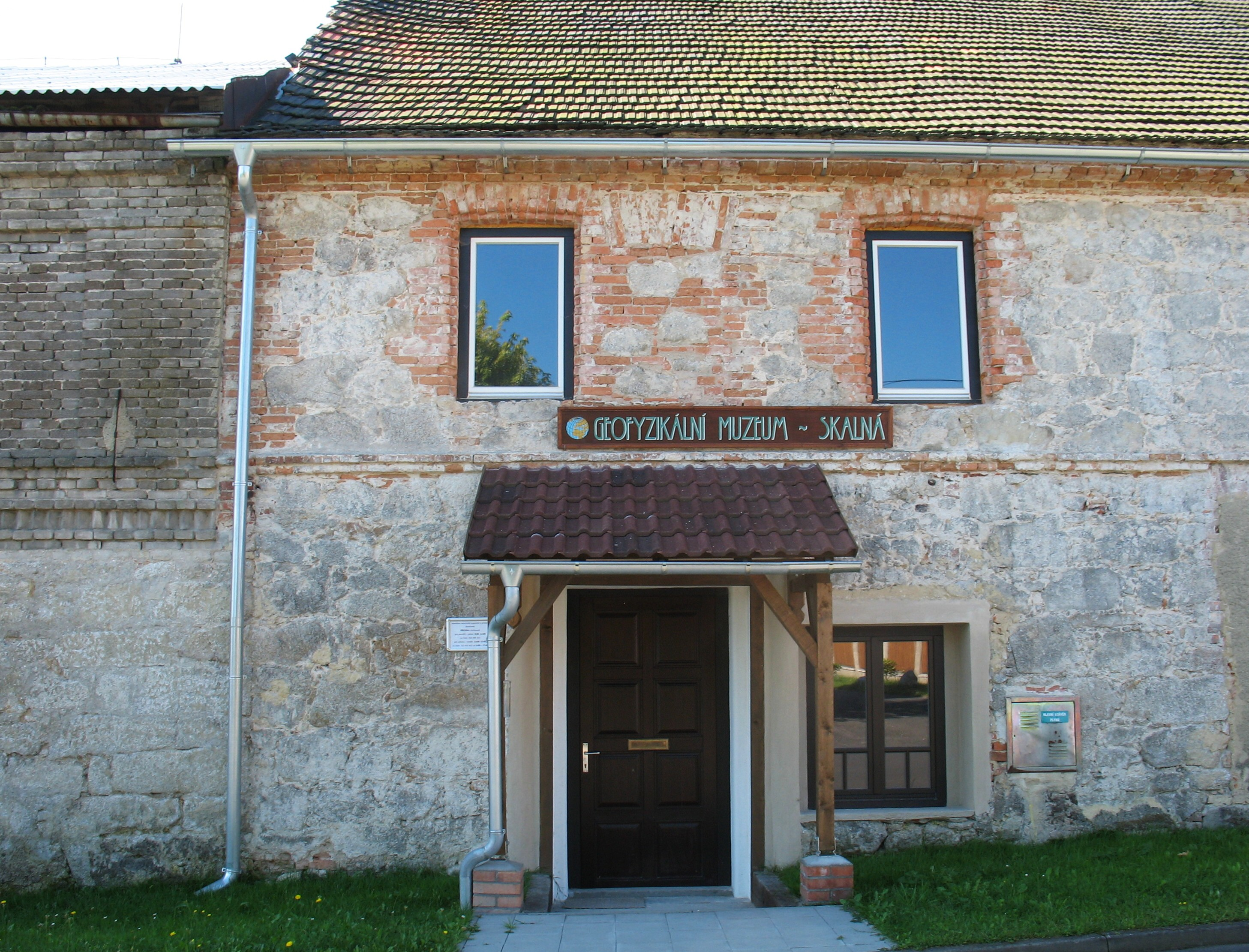 Muzeum bylo otevřeno v areálu rekonstruovaného statku rodiny Noppers v roce 2015